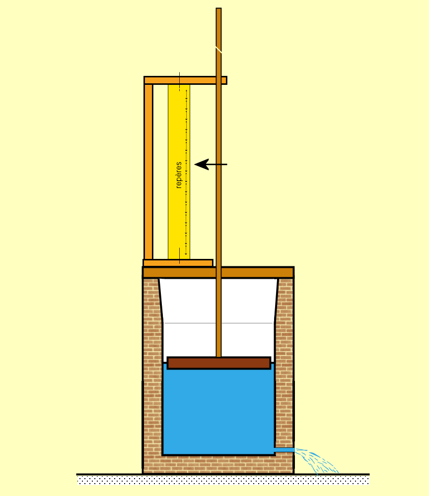 Schéma simplifié de l'horloge hydraulique d'Aropos. Elle est supposée être à écoulement à débit constant. D'après Marilyn Bagley dans Armstrong et Camp, accès en ligne.